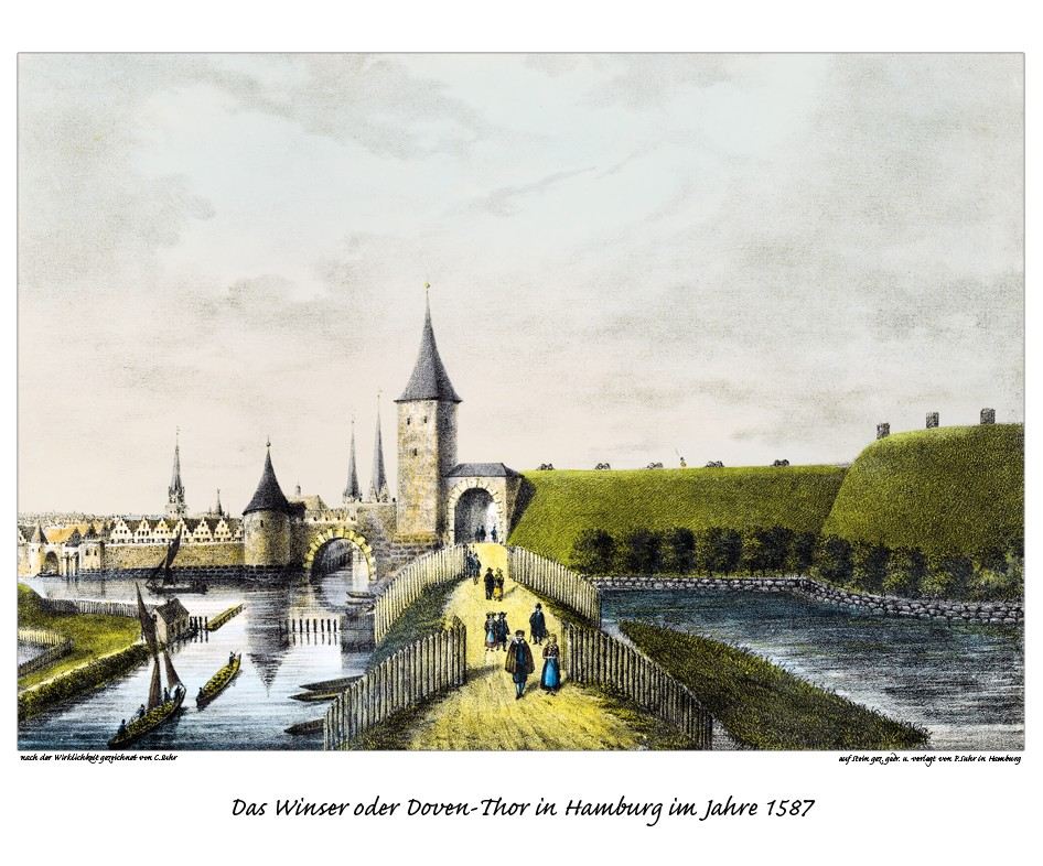 Hamburg,1587, Winser- oder Doven-thor.